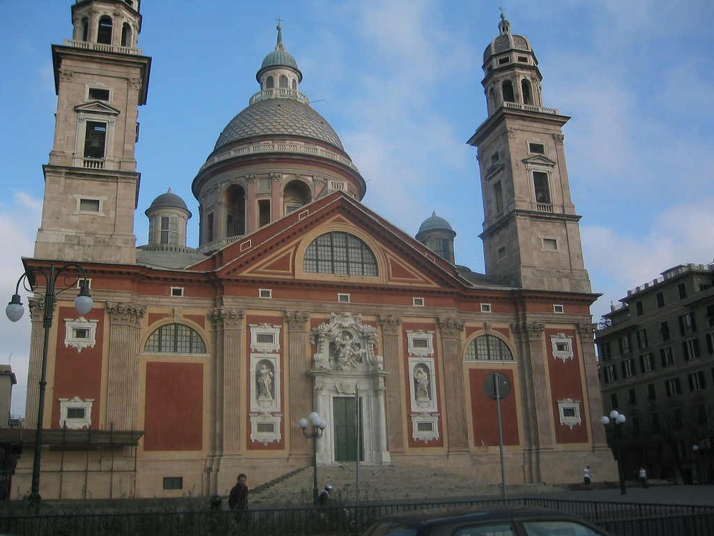 A church in genova (sta maria?)